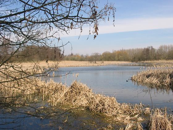 Inselteich im NSG Karower Teiche, Berlin